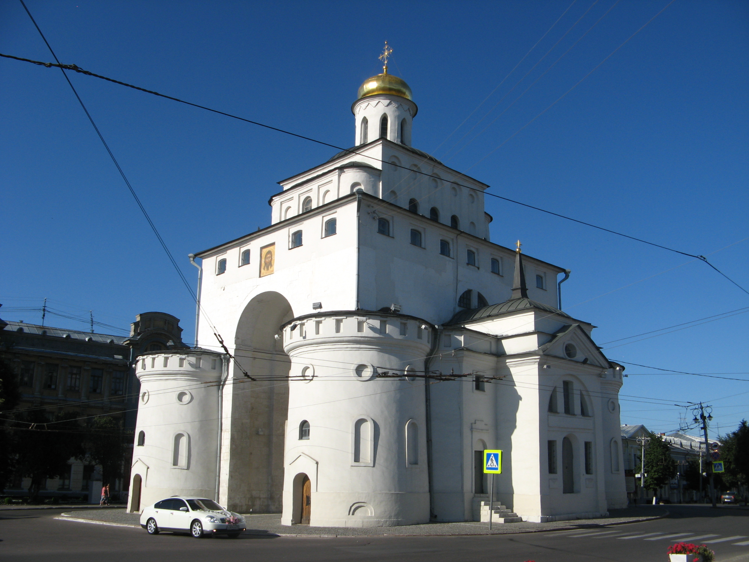 Золотые ворота — выдающийся памятник древнерусской архитектуры, расположенный в городе Владимире